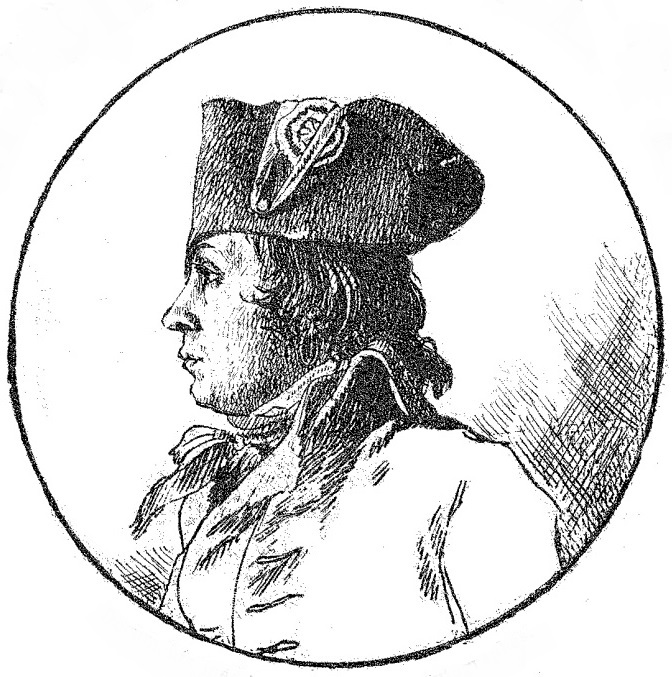 Philippe Le Bas (1762-1794)